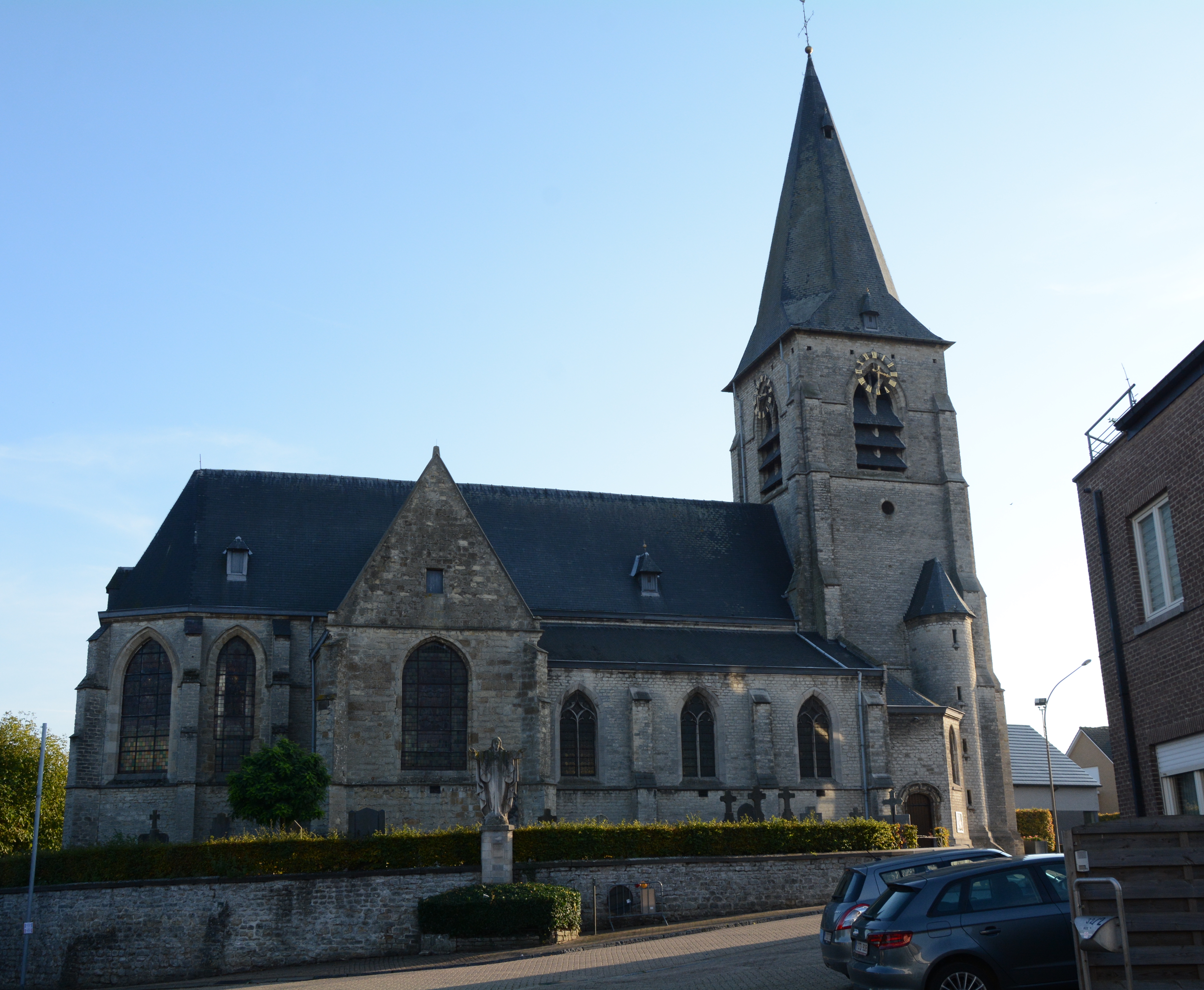 Parochiekerk Sint-Stefanus, Brussegem